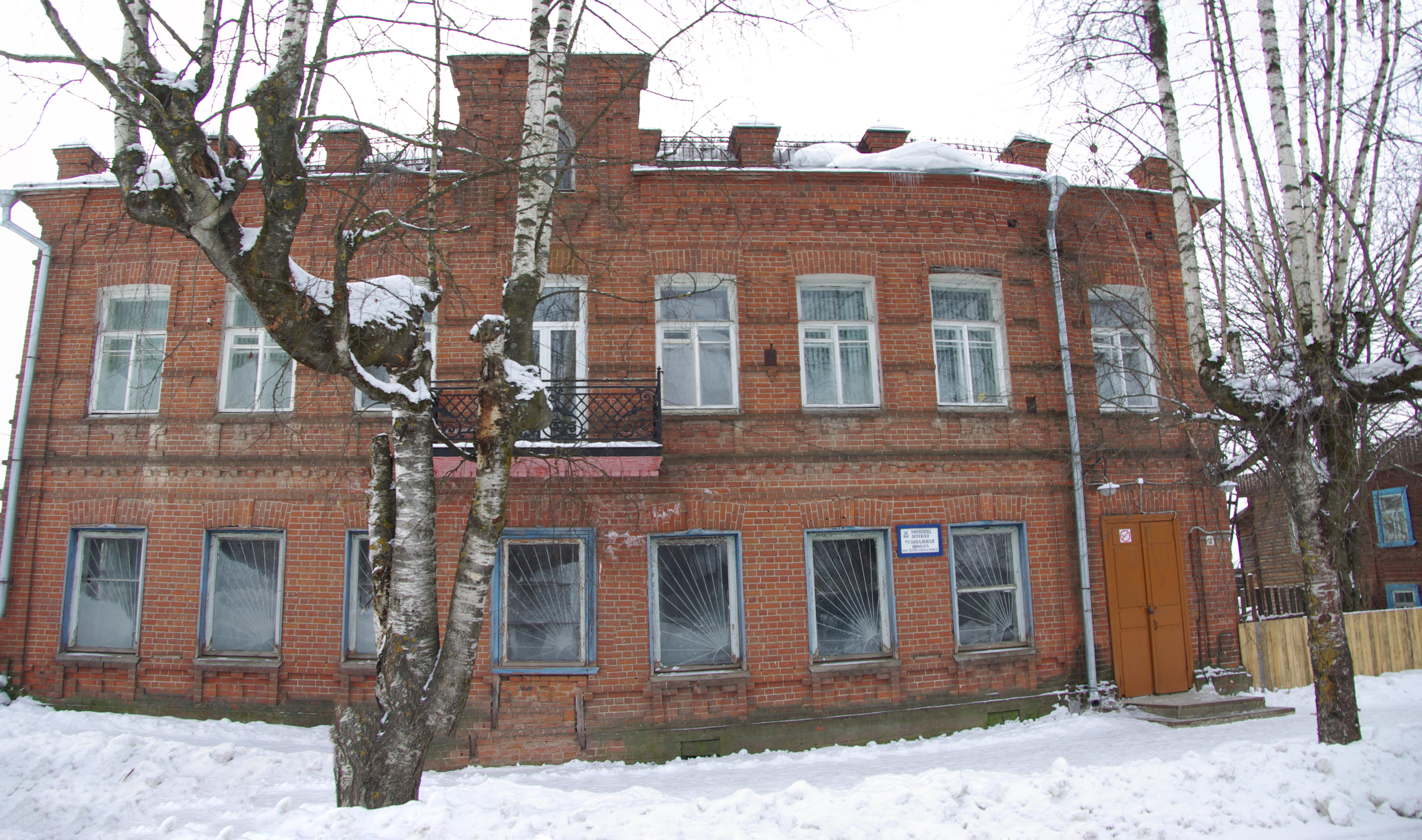 Дом жилой и хлебная лавка Паршина: улица Ленина, 10, Чухлома, Чухломский район, Костромская область